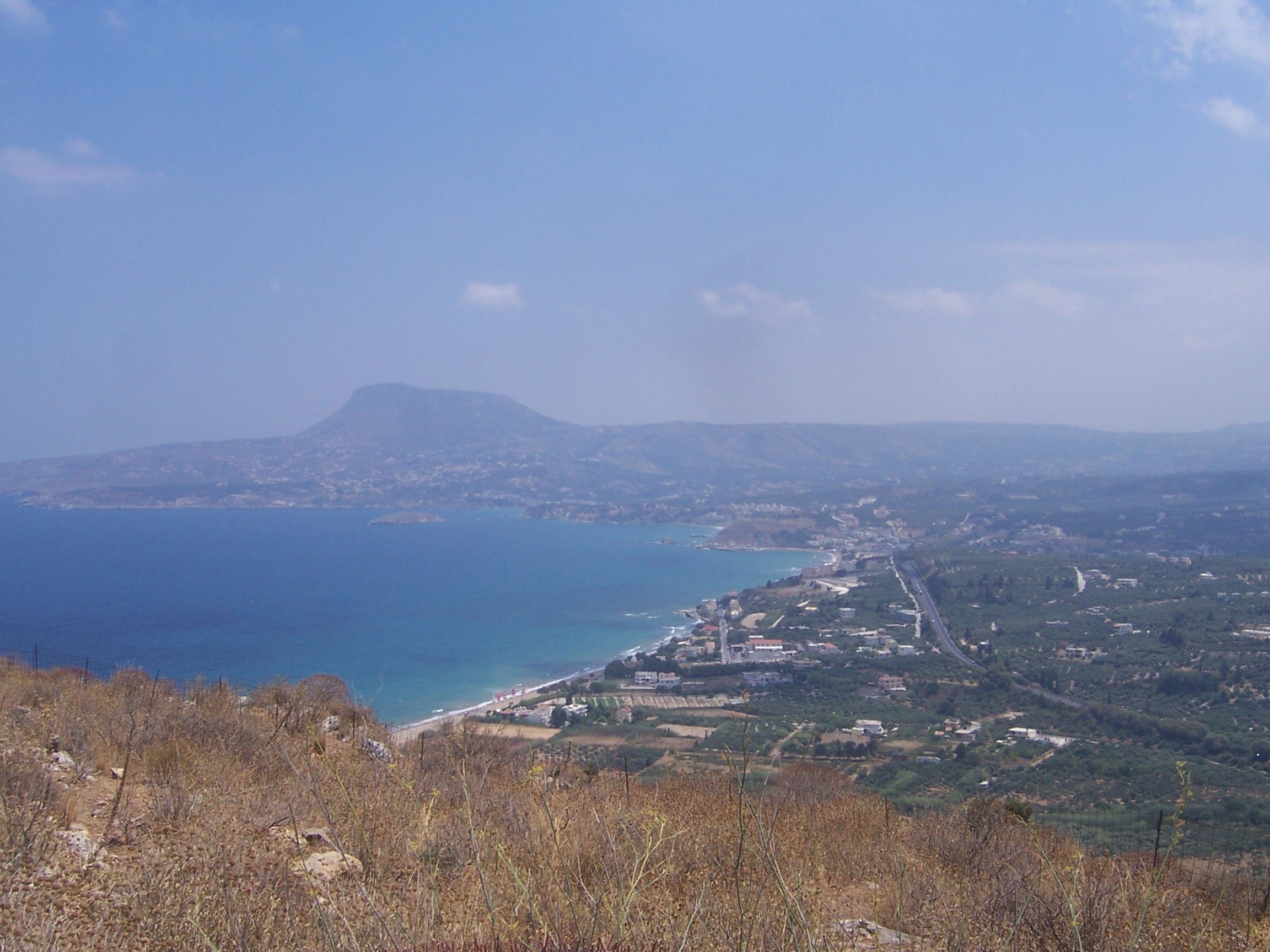 Kalyvès et le cap Drapanon vus depuis Aptera. (Crète)